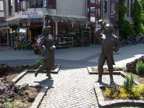 Skulptur Postillon und Christel von der Post